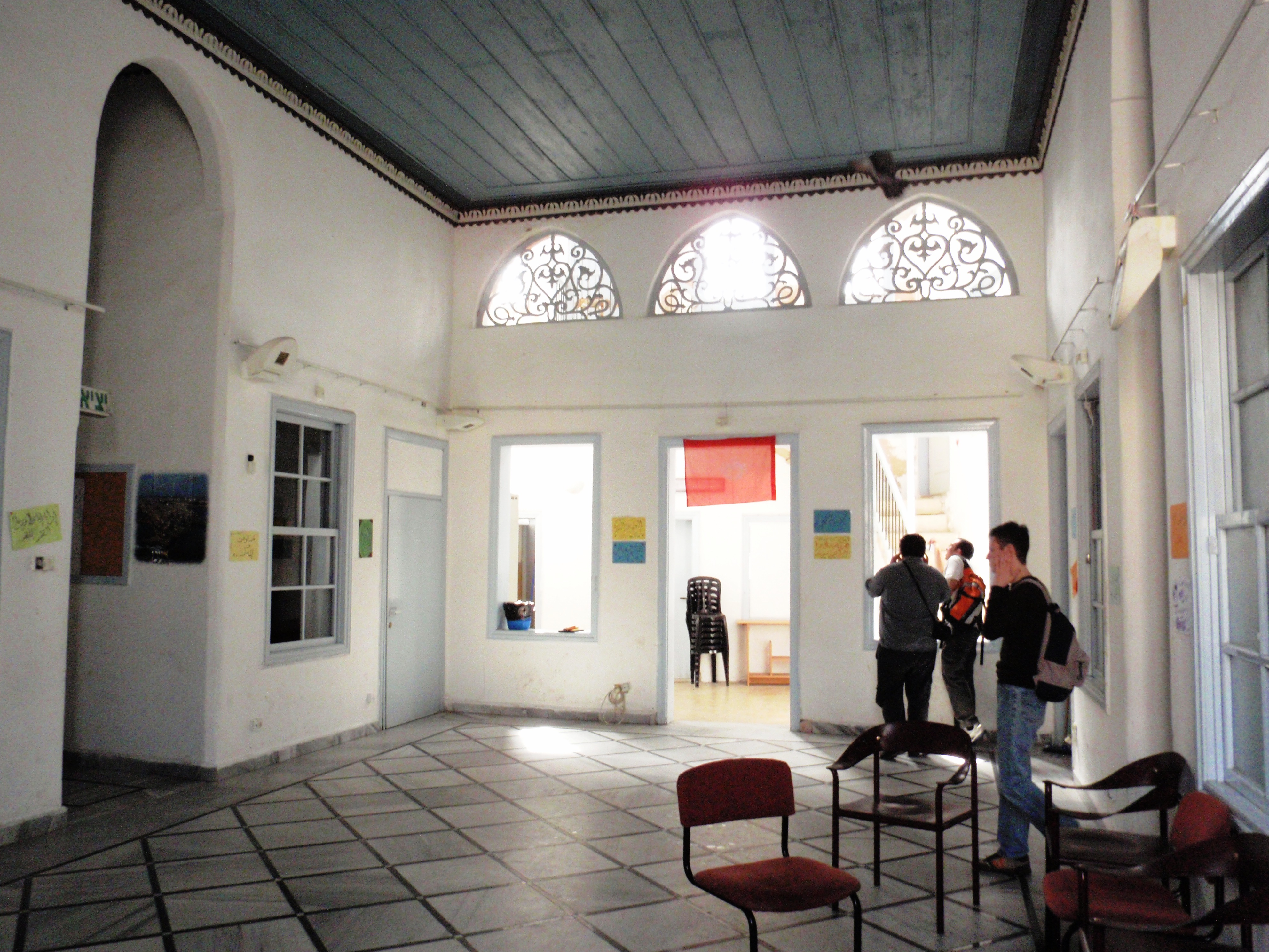 סיור בעכו Youth Center